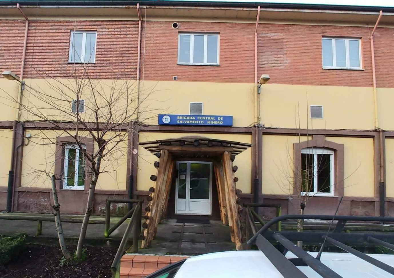 Entrada a las instalaciones de la Brigada Central de Salvamento Minero en Sama de Langreo (España)